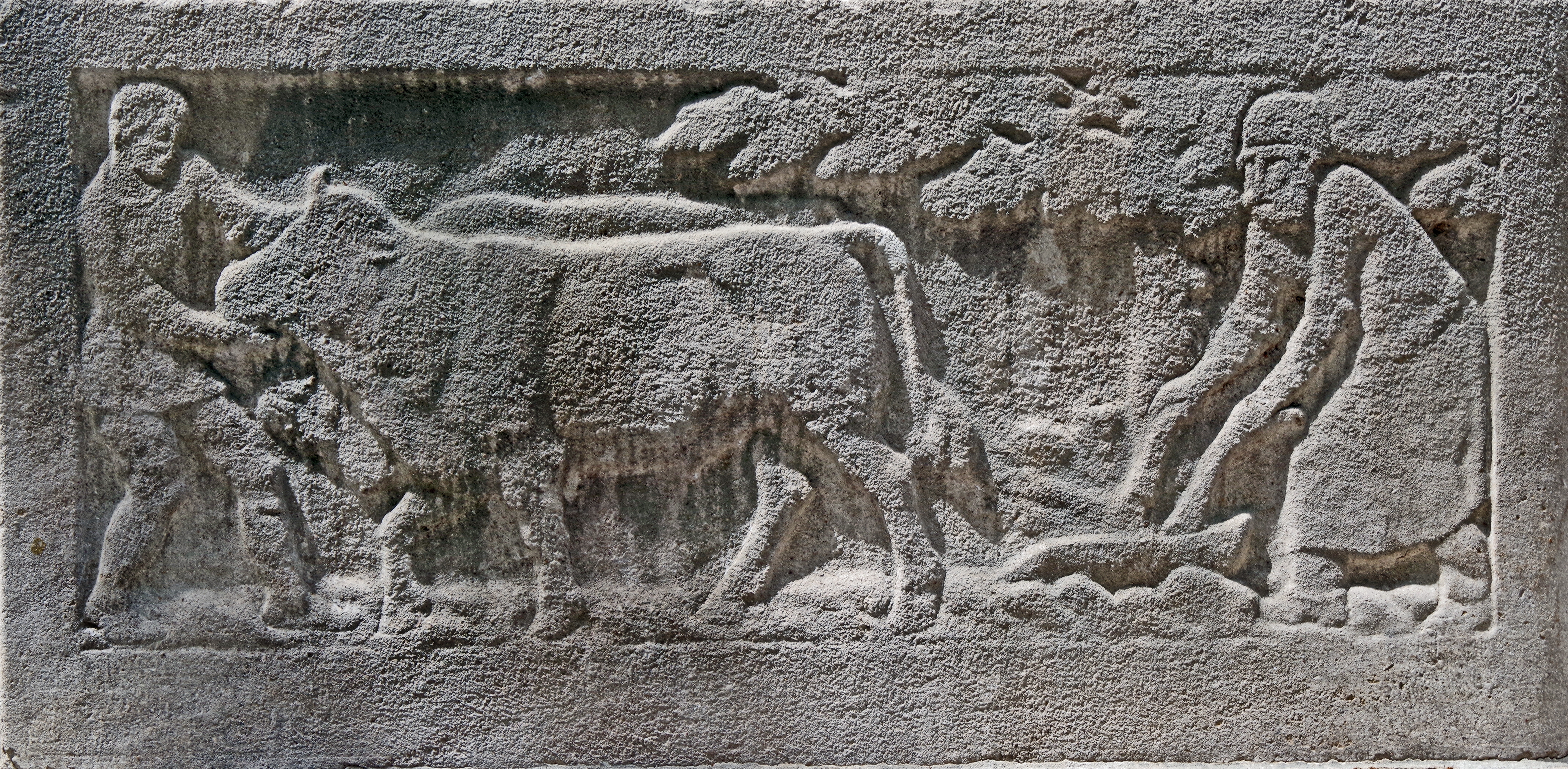 Reformationsdenkmal an der Südfassade der Hospitalkirche in Stuttgart, Relief der linken Brüstungsmauer.